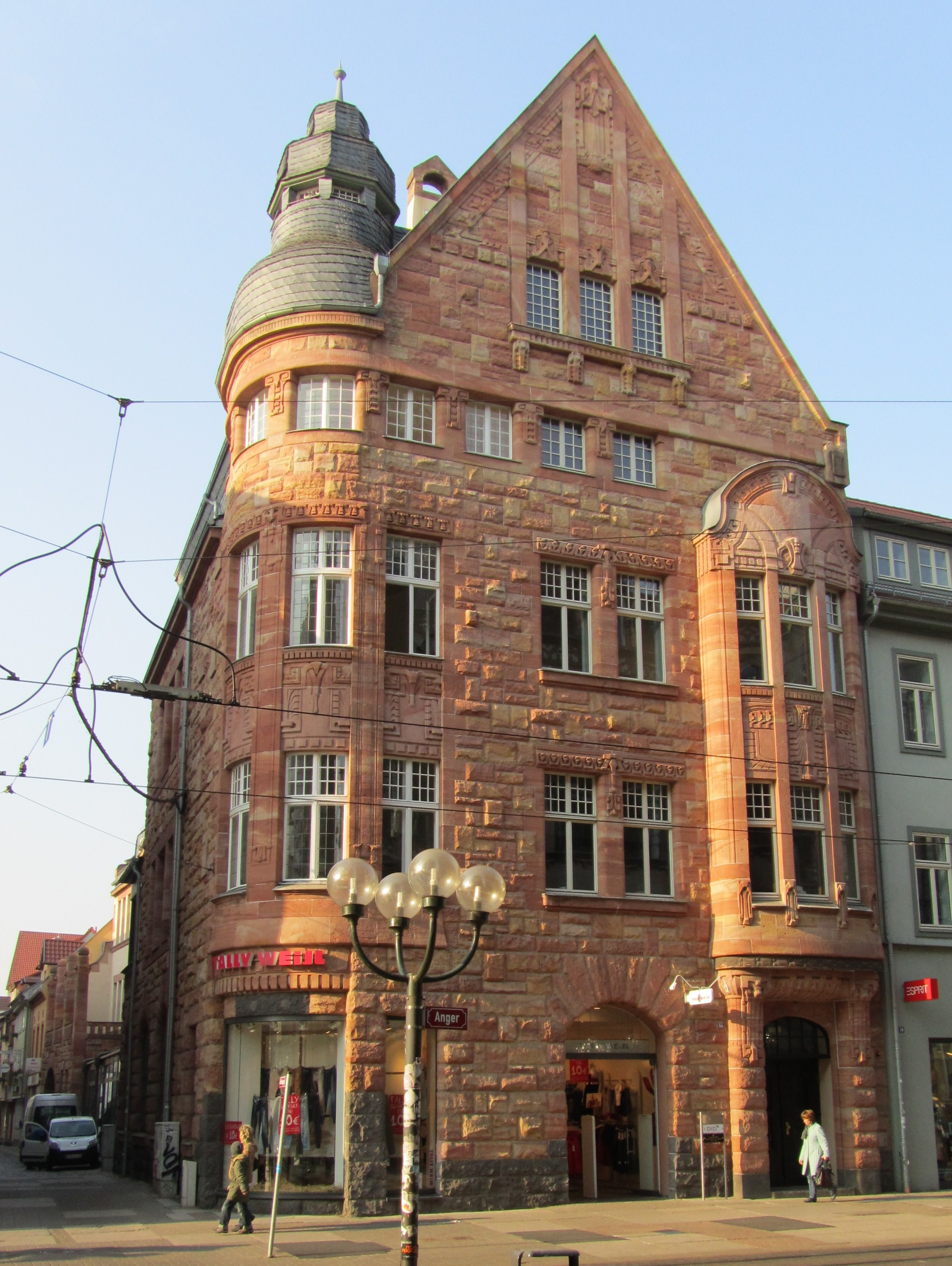 Das Gebäude des ehemaligen Bankhauses Stürcke am Anger in Erfurt.